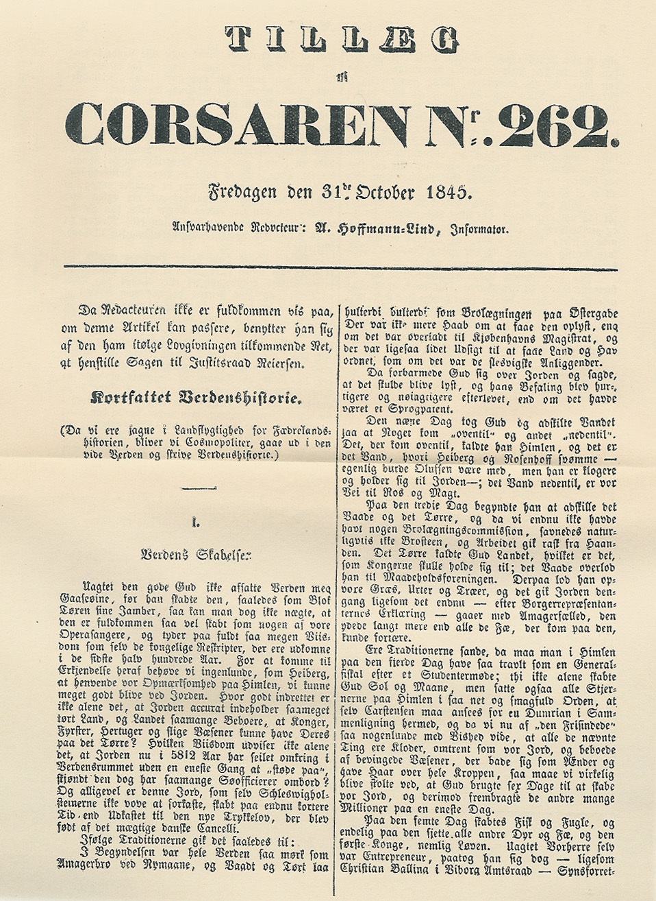 Tillæg til Corsaren side 1. Tillægget blev beslaglagt inden udgivelsen og blev således ikke offentliggjort før det blev reproduceret til P. Hansens litteraturhistorie.